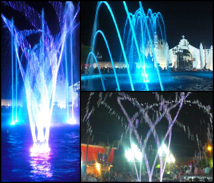 Fuente Danzante Unica en el estado de Morelos